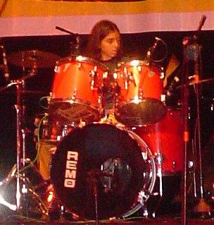 Jonatan na apresentação do IV Festival Macaé de Música Brasileira, no Teatro Municipal de Macaé/RJ.